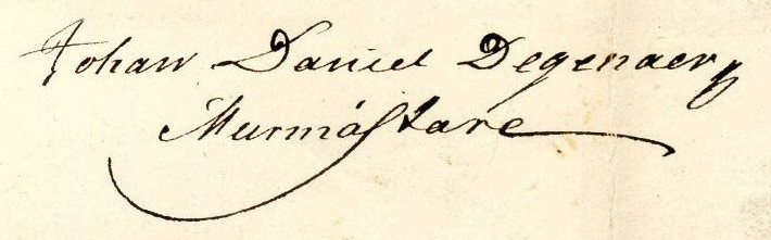 Johan Daniel Degenaers signatur